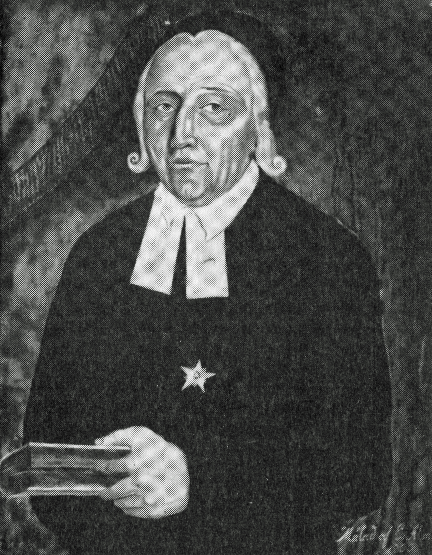 Prosten Anders Chydenius, målning av Emanuel Alm 1800, Kaustby kyrka.